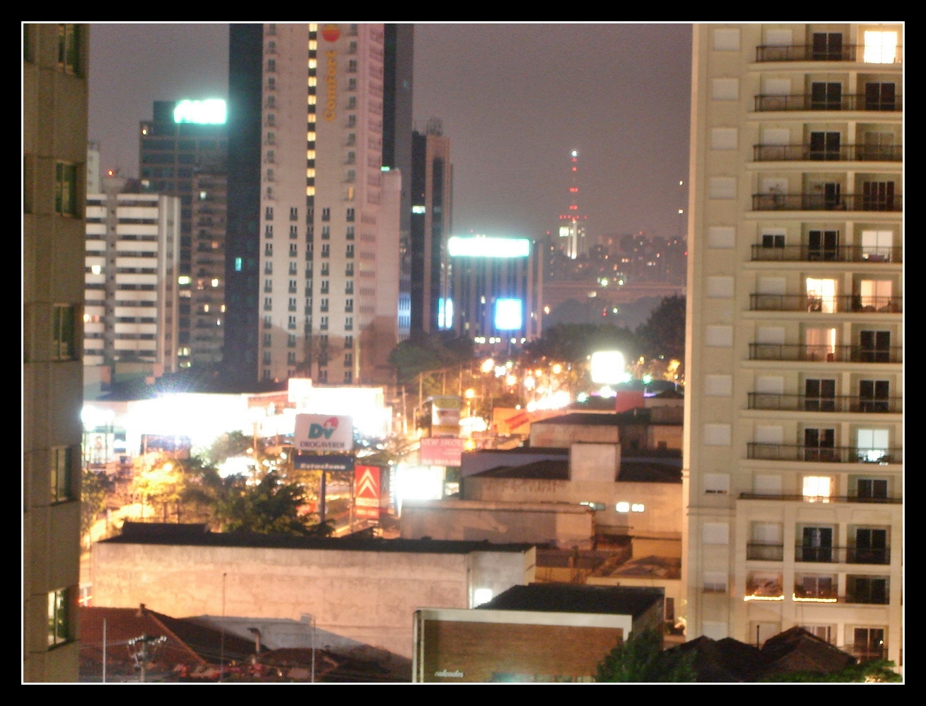 Avenida Ibirapuera